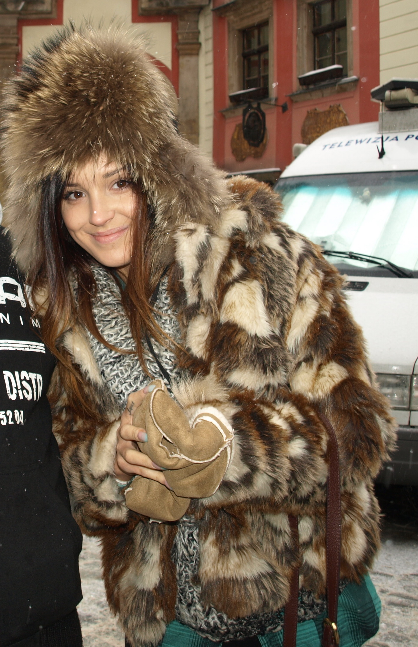 Marina Łuczenko w 2010 roku